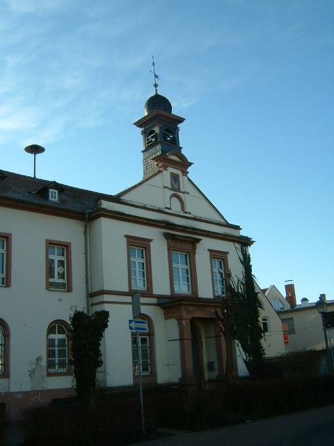 Schwalbach am Taunus, alte Schule